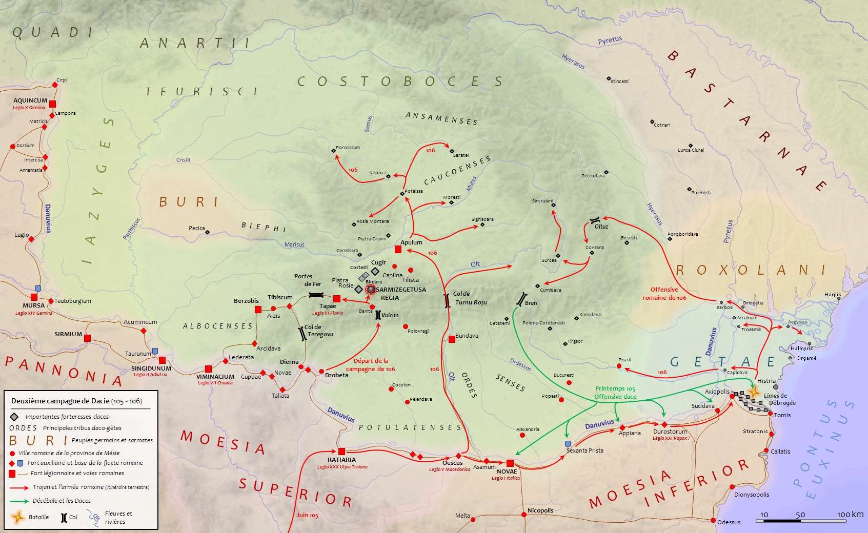 La Dacie pendant la deuxième expédition dacique de Trajan en 105/106